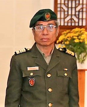 Der Chefe de Casa Militar vom Präsidialamt Osttimors Oberst António Soares da Silva („Mau Kalo“)